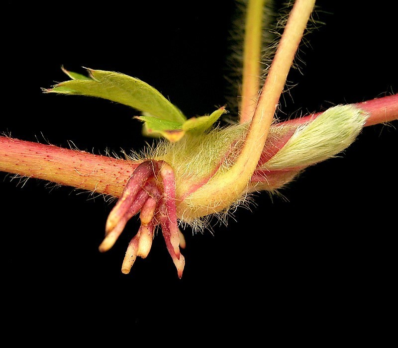 Fragaria × ananassa (Fragaria virginiana × Fragaria chiloensis) × Comarum palustre 'Pink Panda'